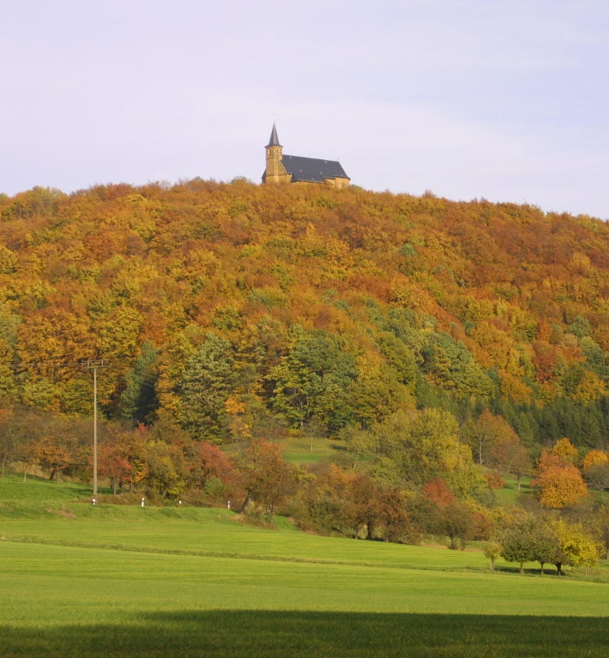 Gügel in Franconia